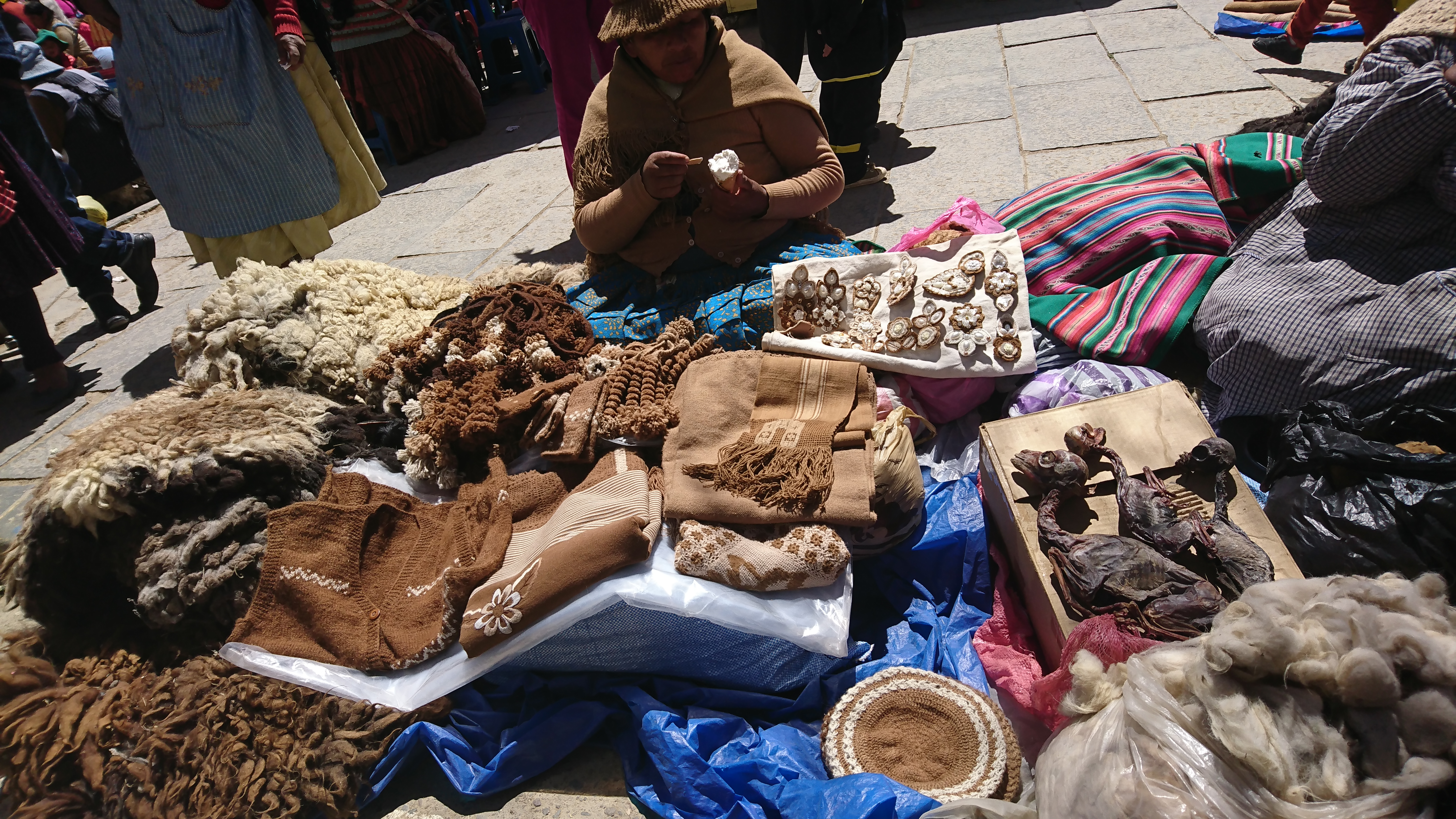 venta de derivados de camélidos de uso ritual y utilitario en la feria de natividad de la ciudad de Viacha